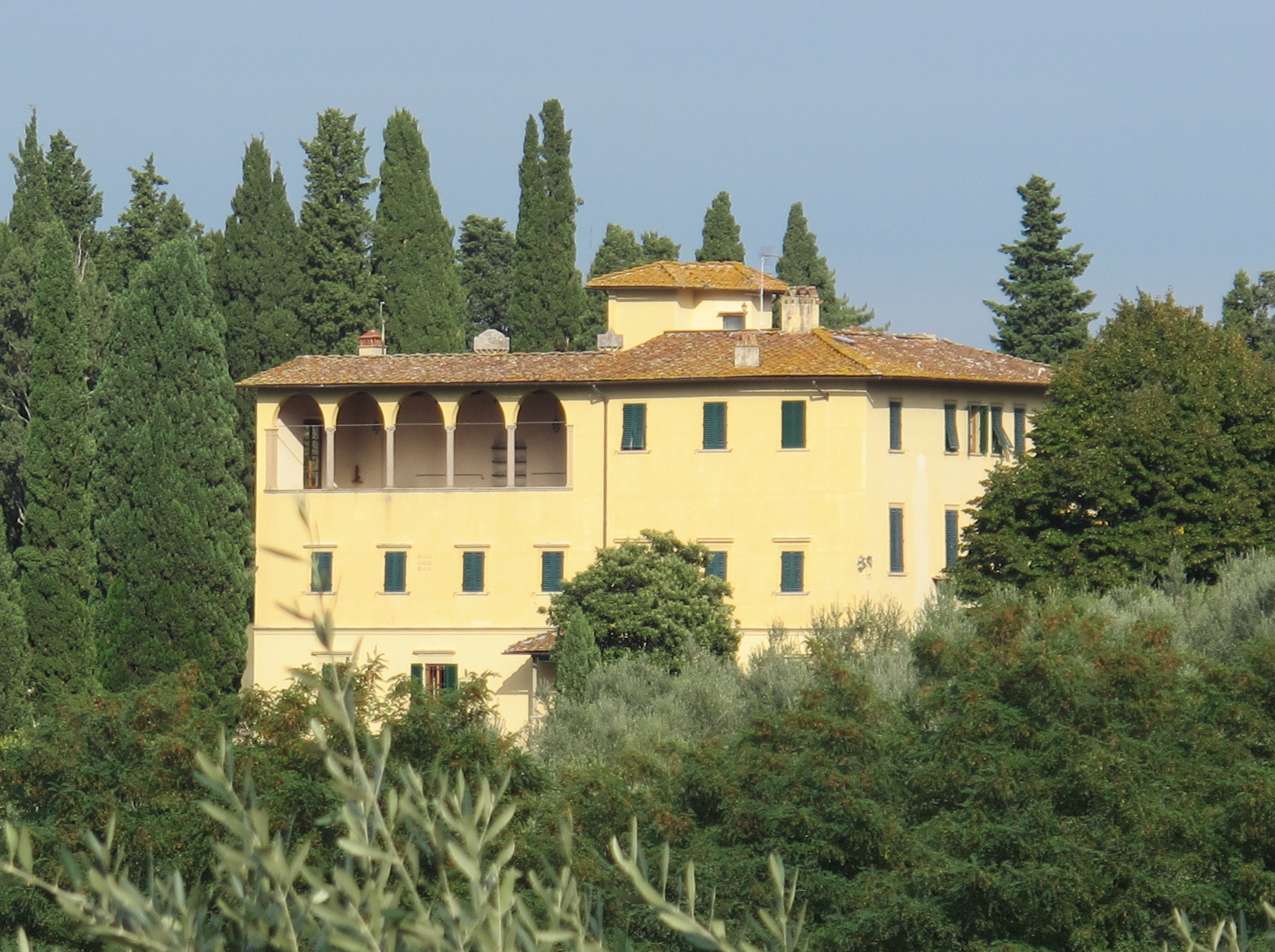 Firenze